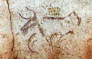 Replique d'une peinture rupestre des grottes de Saint-Marcel-d'Ardèche, Ardèche, France.